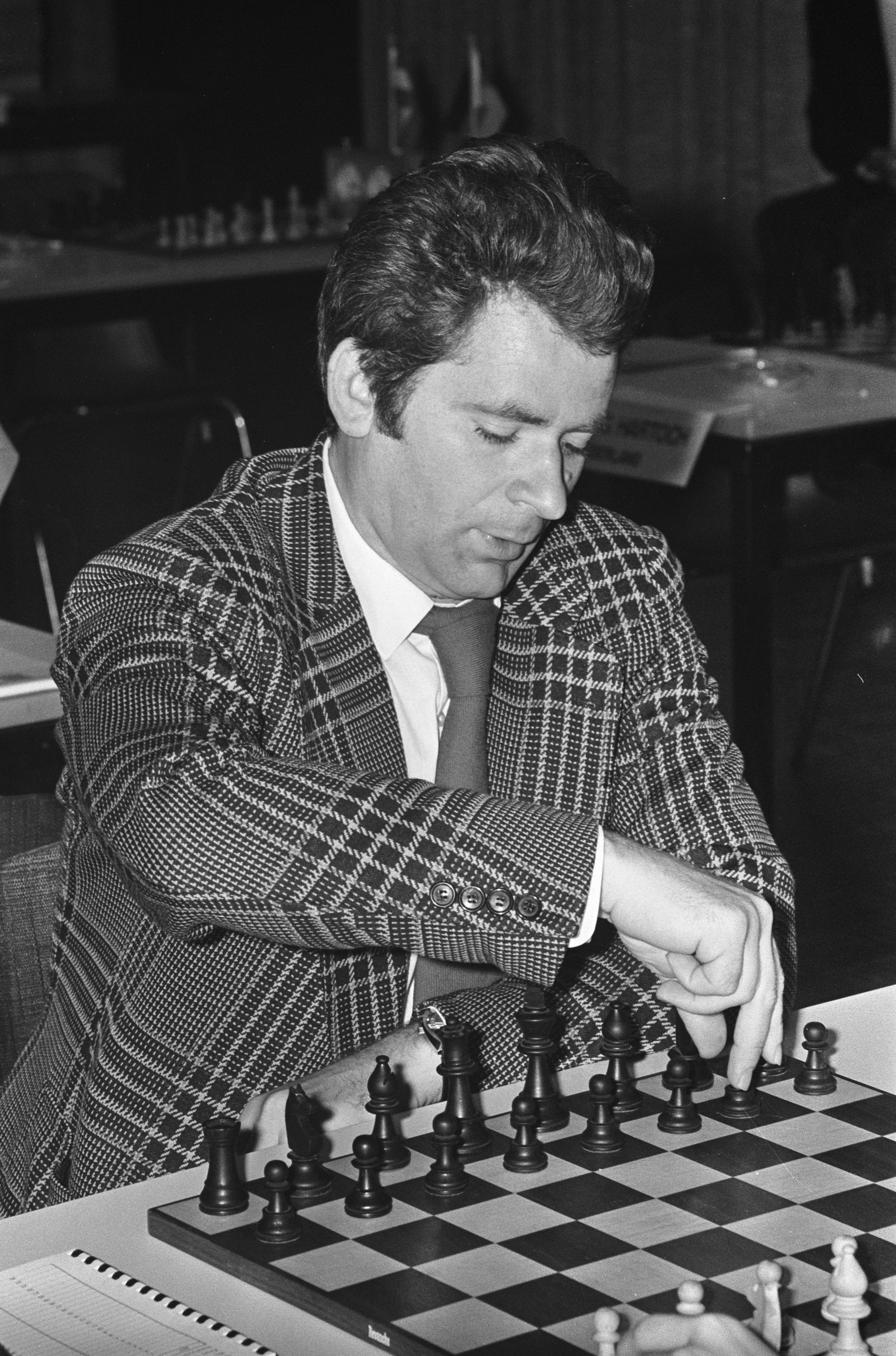 Collectie / Archief : Fotocollectie Anefo Reportage / Serie : [ onbekend ] Beschrijving : Eerste ronde IBM-schaaktoernooi, Boris Spasski Datum : 17 juli 1973 Locatie : Amsterdam, Noord-Holland Trefwoorden : portretten, schaken, sport Persoonsnaam : Spassky, Boris Fotograaf : Croes, Rob C. / Anefo Auteursrechthebbende : Nationaal Archief Materiaalsoort : Negatief (zwart/wit) Nummer archiefinventaris : bekijk toegang 2.24.01.05 Bestanddeelnummer : 926-5521